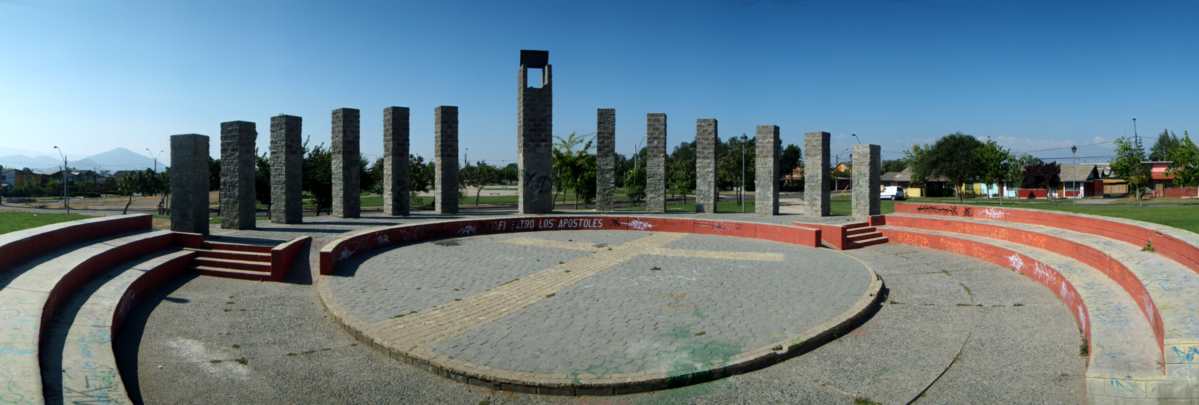 Anfiteatro Los Apóstoles, ubicado en el Parque Tres Poniente de la comuna de Maipú. Santiago de Chile. Fue contruido durante la gestión del entonces alcalde Roberto Sepúlveda (2000 - 2004) para la comunidad evangélica. Imagen panorámica creada usando Autostitch 2.2 y Photoshop 7.0.